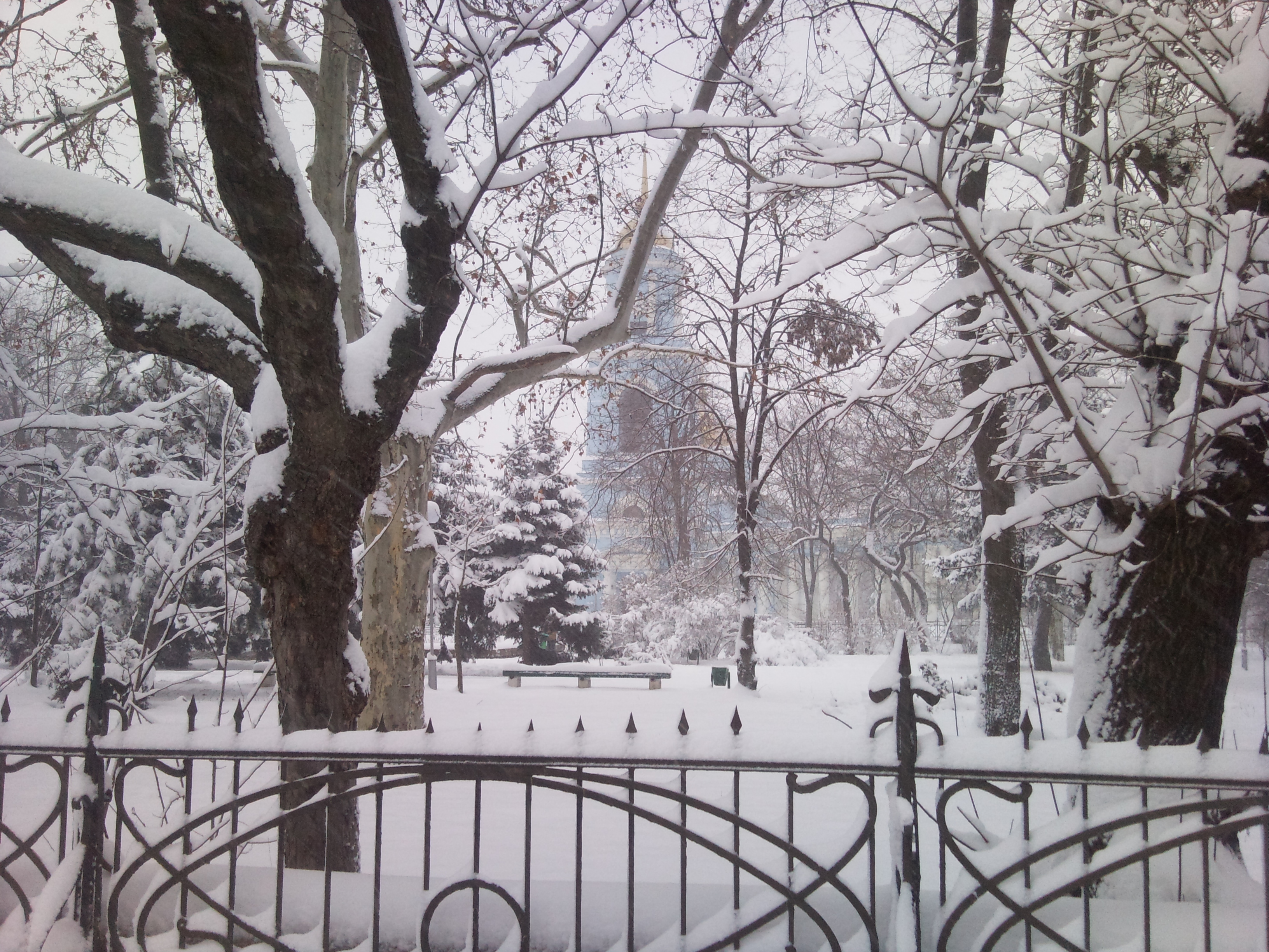 budzhak bessarabiya